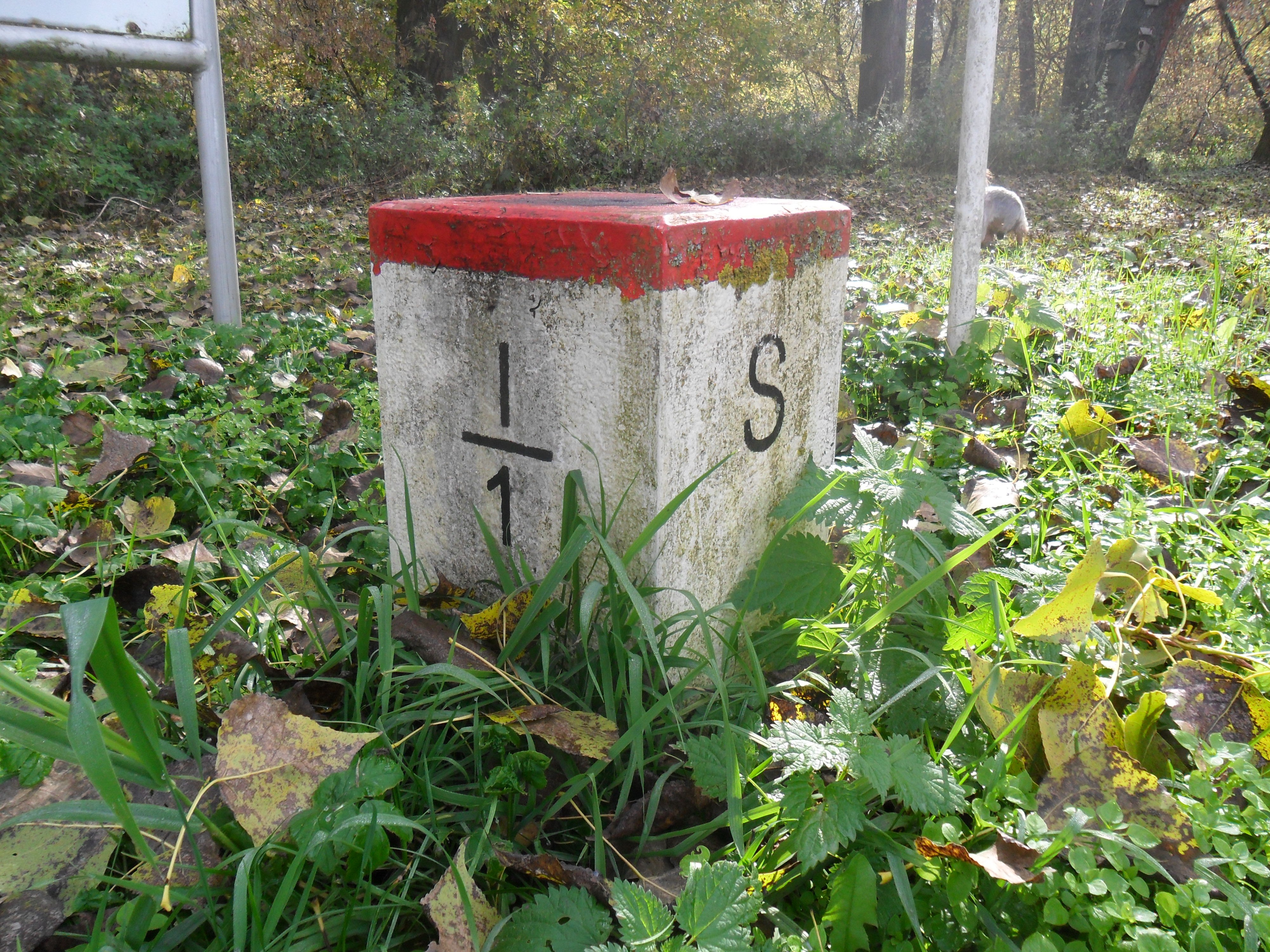 Hraničný kameň